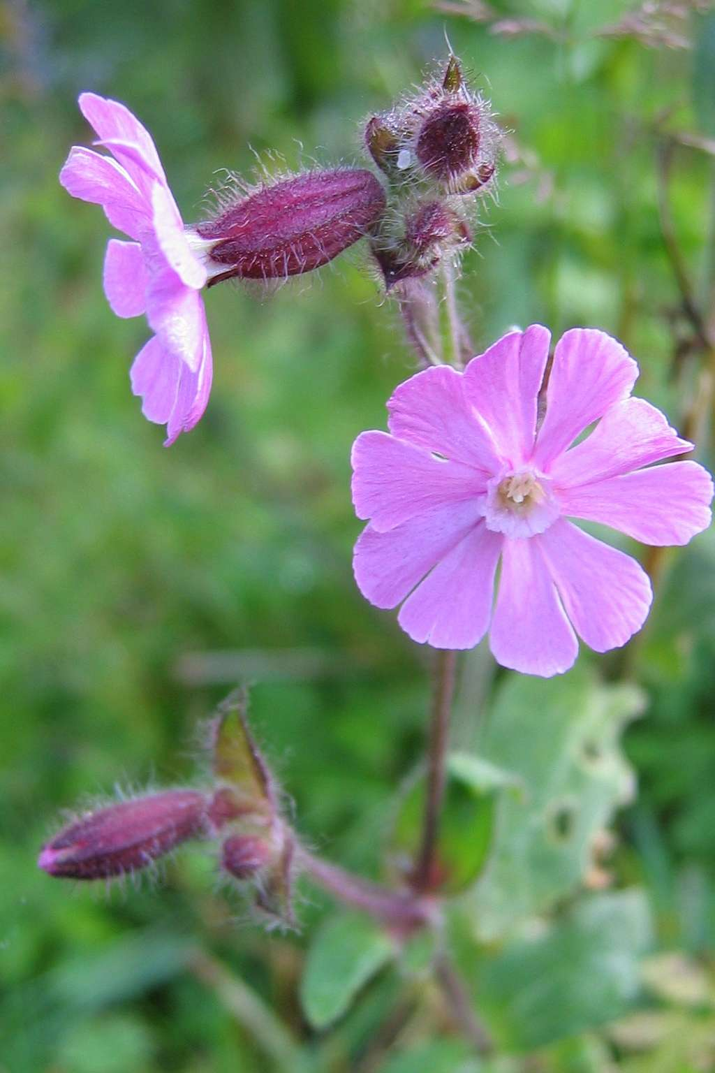 Rote Lichtnelke (Silene dioica) Fundort: Nähe Bosruckhütte, Österreich